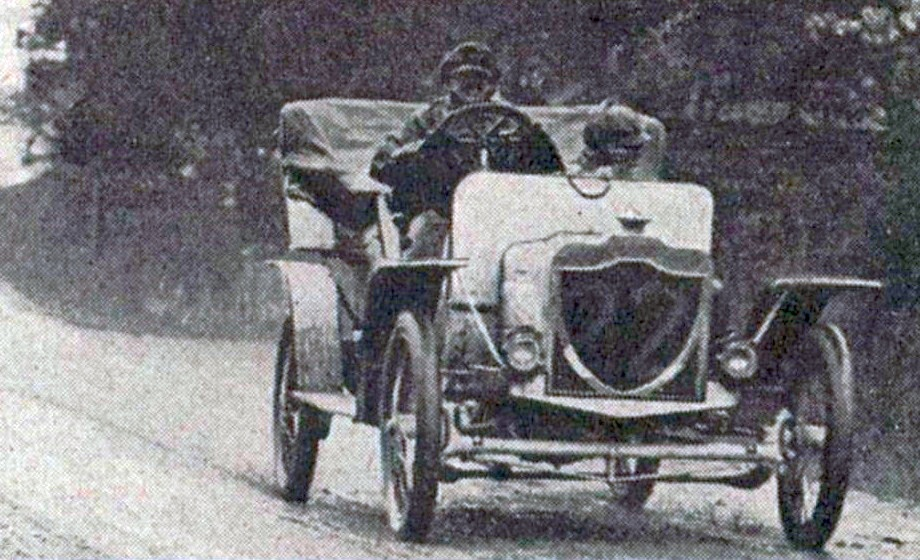 Ernest Curtis, sur Rover 20 hp, vainqueur du RAC Tourist Trophy 1907, La Vie au Grand Air, 15 juin 1907, p. 403